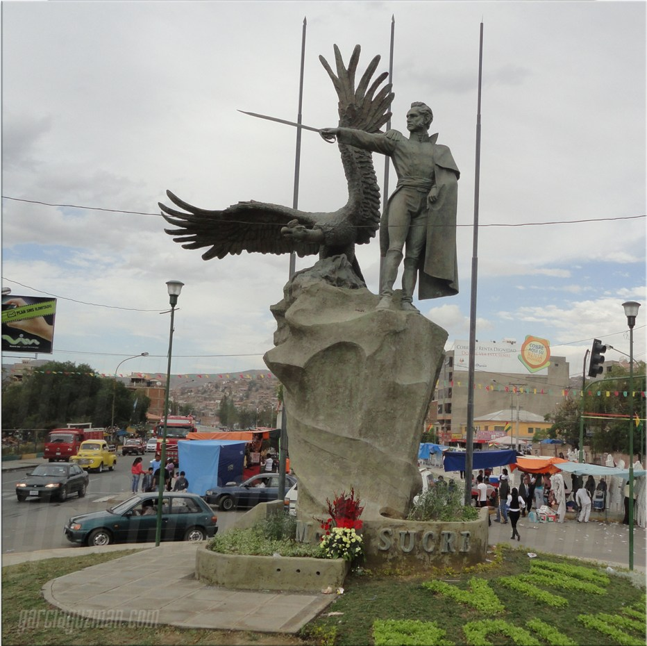 Mariscal Sucre ubicado en la av. 6 de agosto de Cochabamba